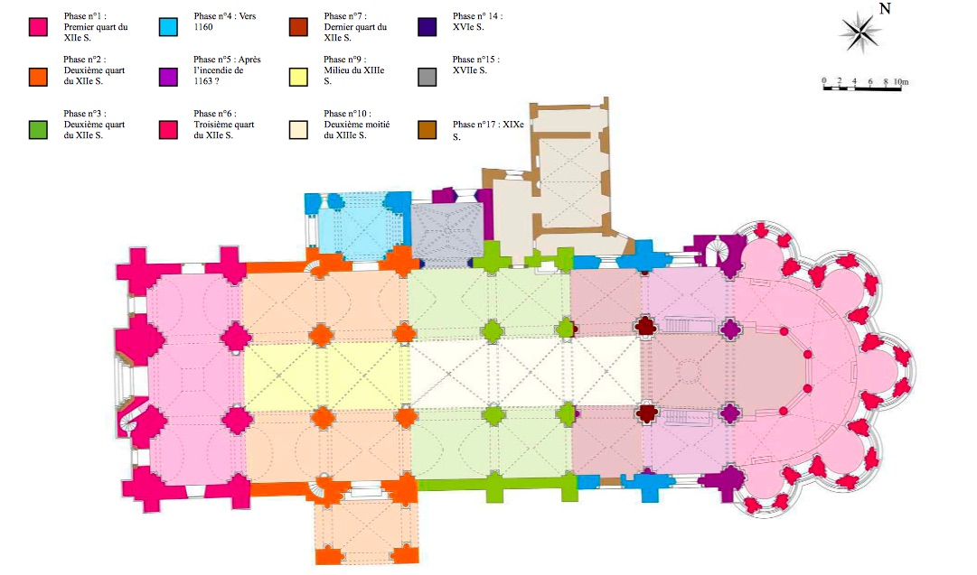 plan de construction de la basilique de Brioude VIVIER